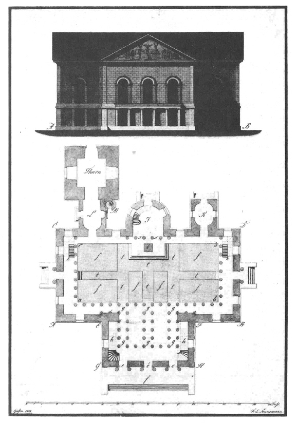 Entwurf der neuen Gießener Stadtkirche von 1808, von F. L. Sonnemann. In: Karlheinz Lang, Zur Baugeschichte der Stadtkirche in Gießen, in: MOHG 73, 1988, S. 195